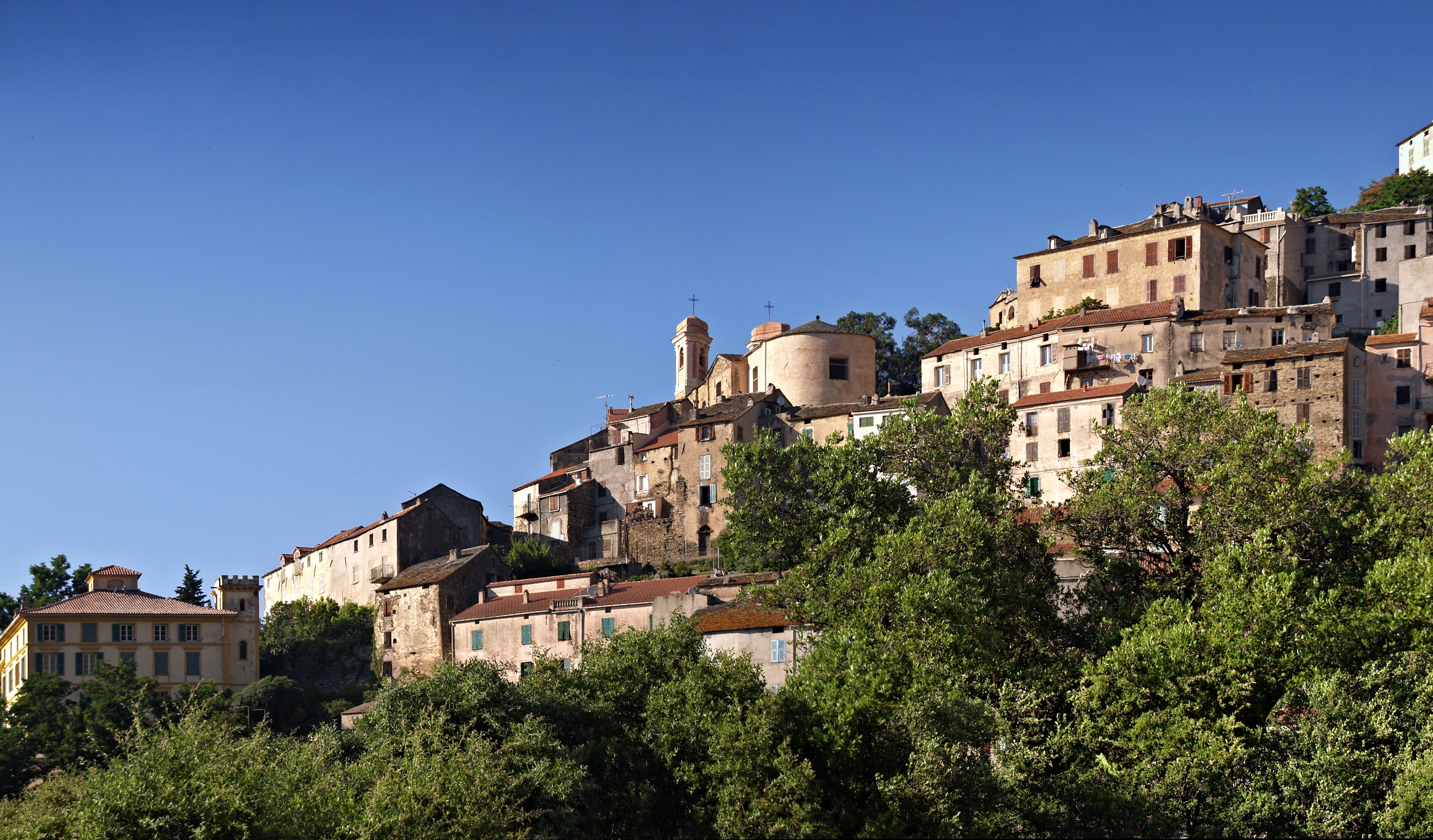 Oletta (Corse) - Panorama du village